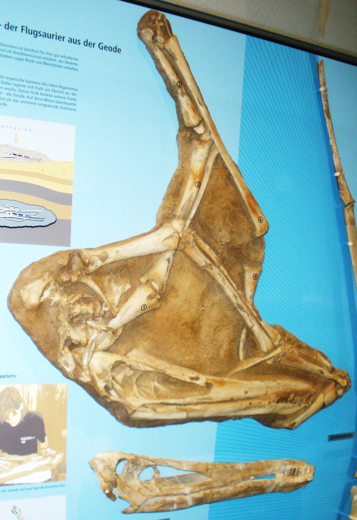 Fossil of Santanadactylus pricei and Anhanguera santanae, an extinct pterosaur- Took the photo at Senckenberg Museum of Frankfurt